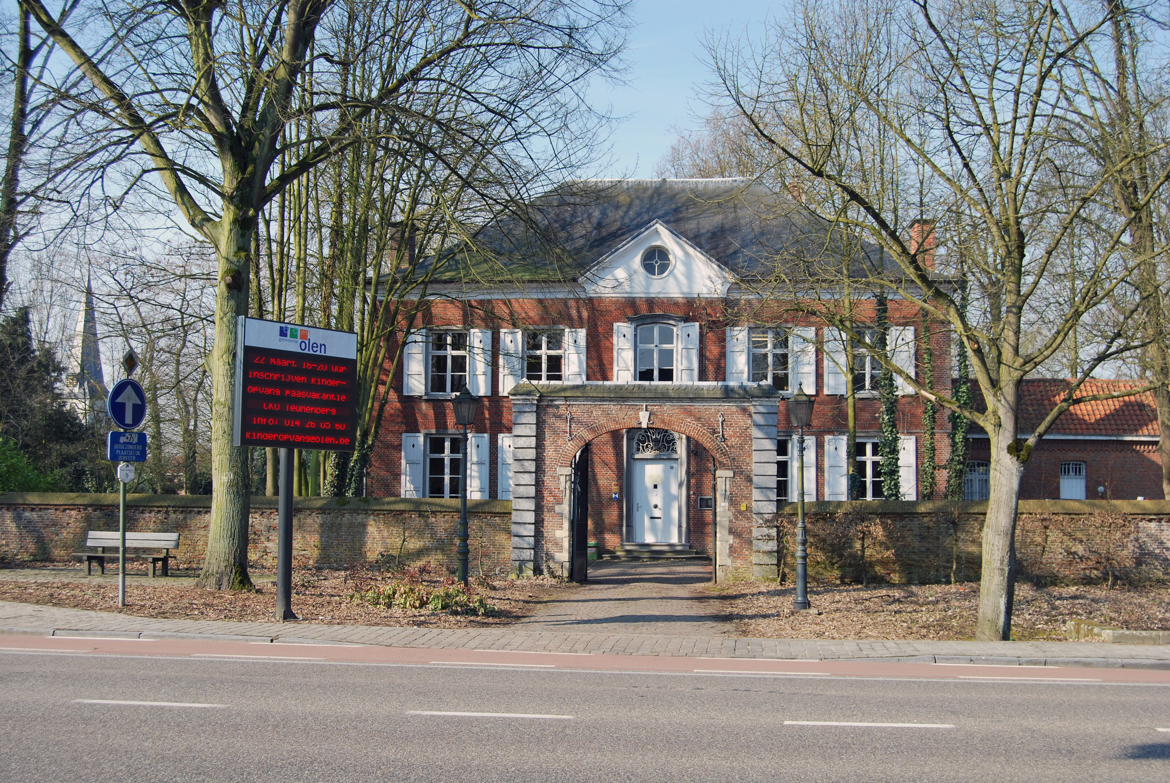 Oude Pastorij van parochie Sint-Martinus in het dorp van Olen Centrum. Nu huisvest de oude pastorie diensten van het OCMW